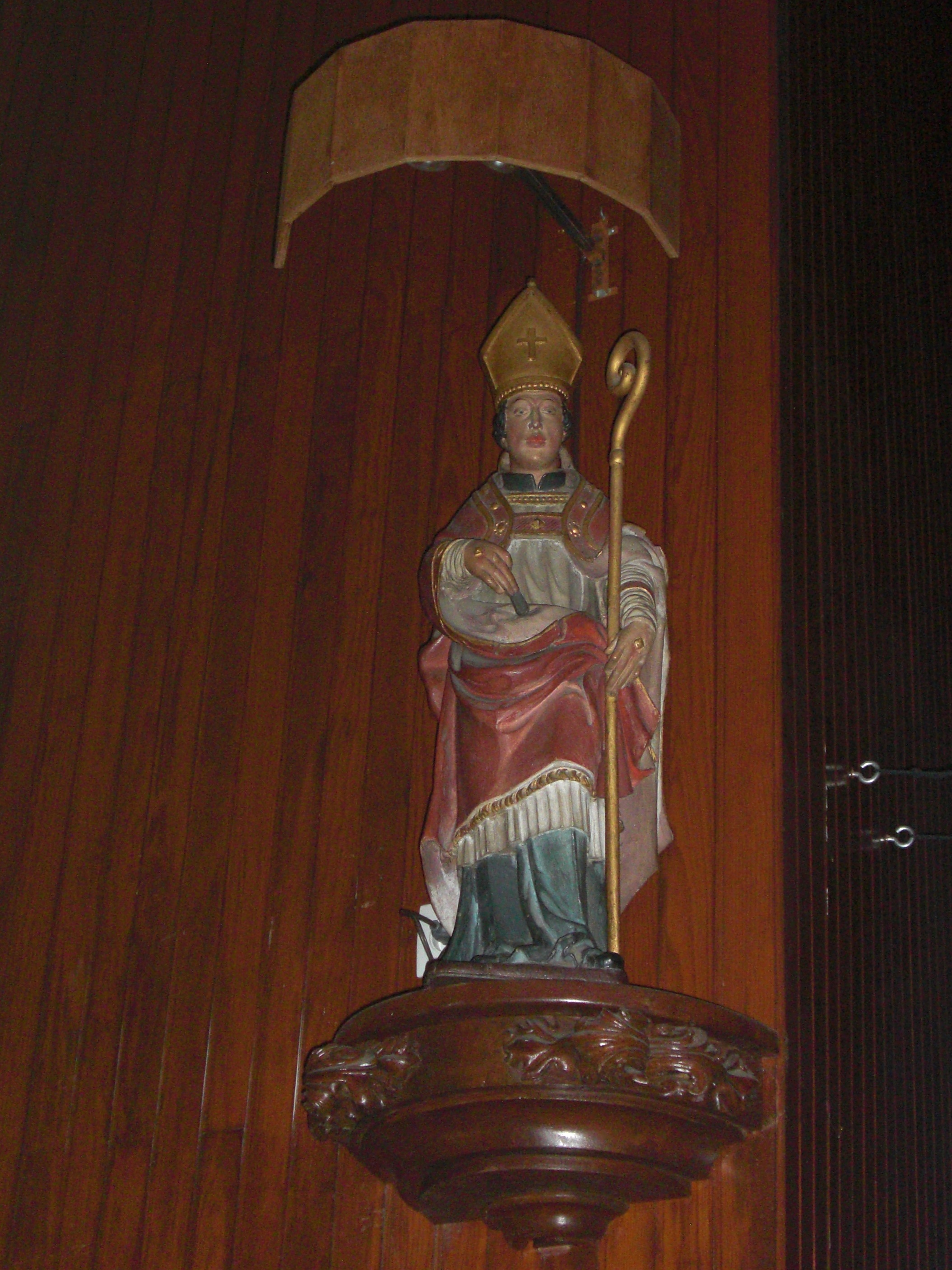 Statue de Saint Léger près de l'autel dans l'église Saint-Léger de Saint-Germain-en-Laye, 17 avril 2013